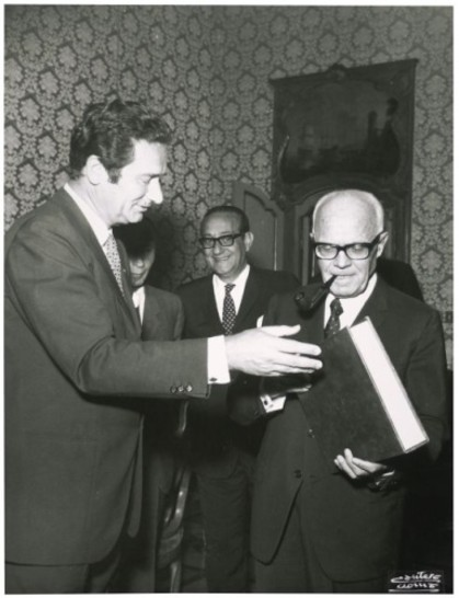 Presentazione dei volumi "Montecitorio - Uomini e fatti" e "La Camera dei deputati" editi da Editalia Presentazione volumi "Montecitorio - Uomini e fatti" e "La Camera dei deputati"